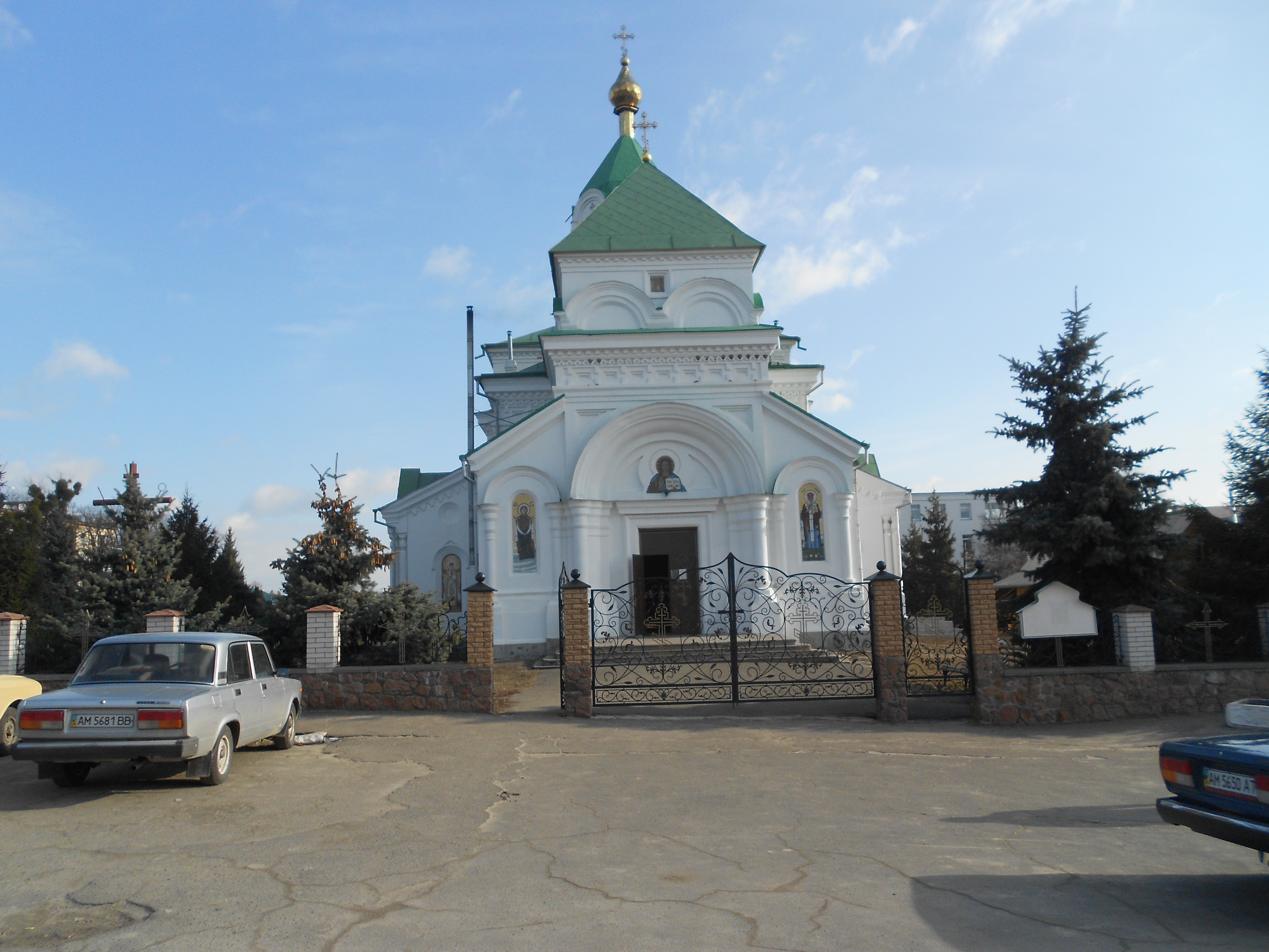 Свято-Миколаївський собор – пам’ятка архітектури, Житомирська область, Радомишльський р-н, м. Радомишль, Соборний майдан.